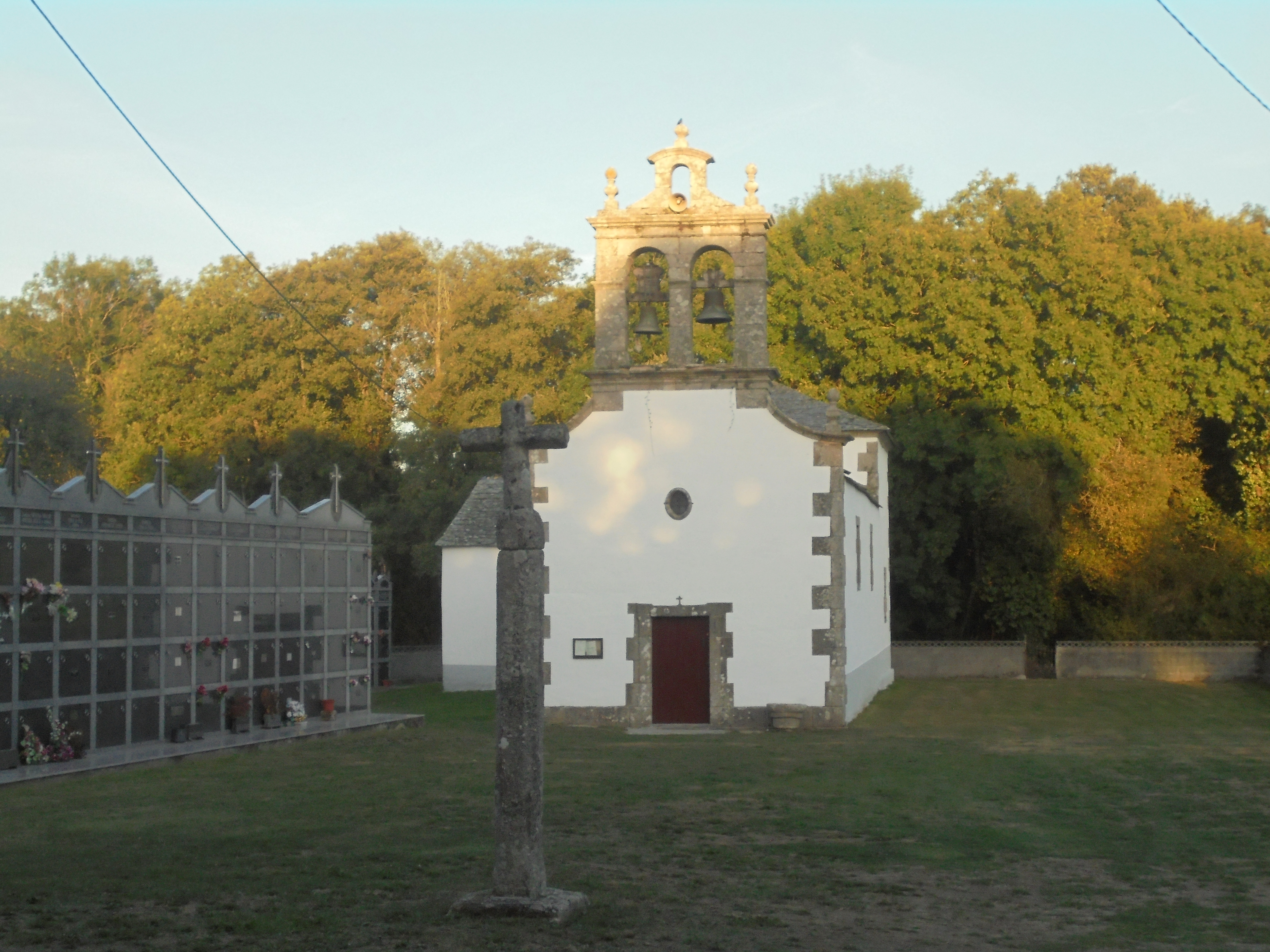 Igrexa parroquial de Silva ( Pol)